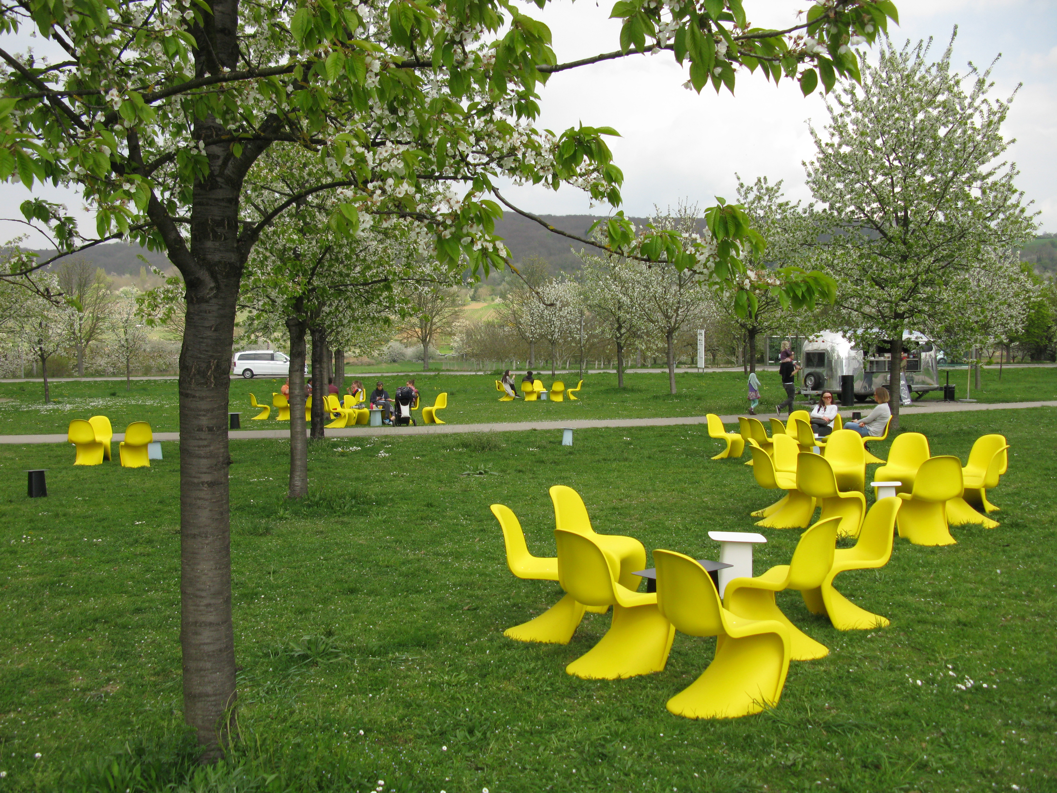 Panton chairs vor dem Vitra Haus in Weil am Rhein mit Airstream Kiosk